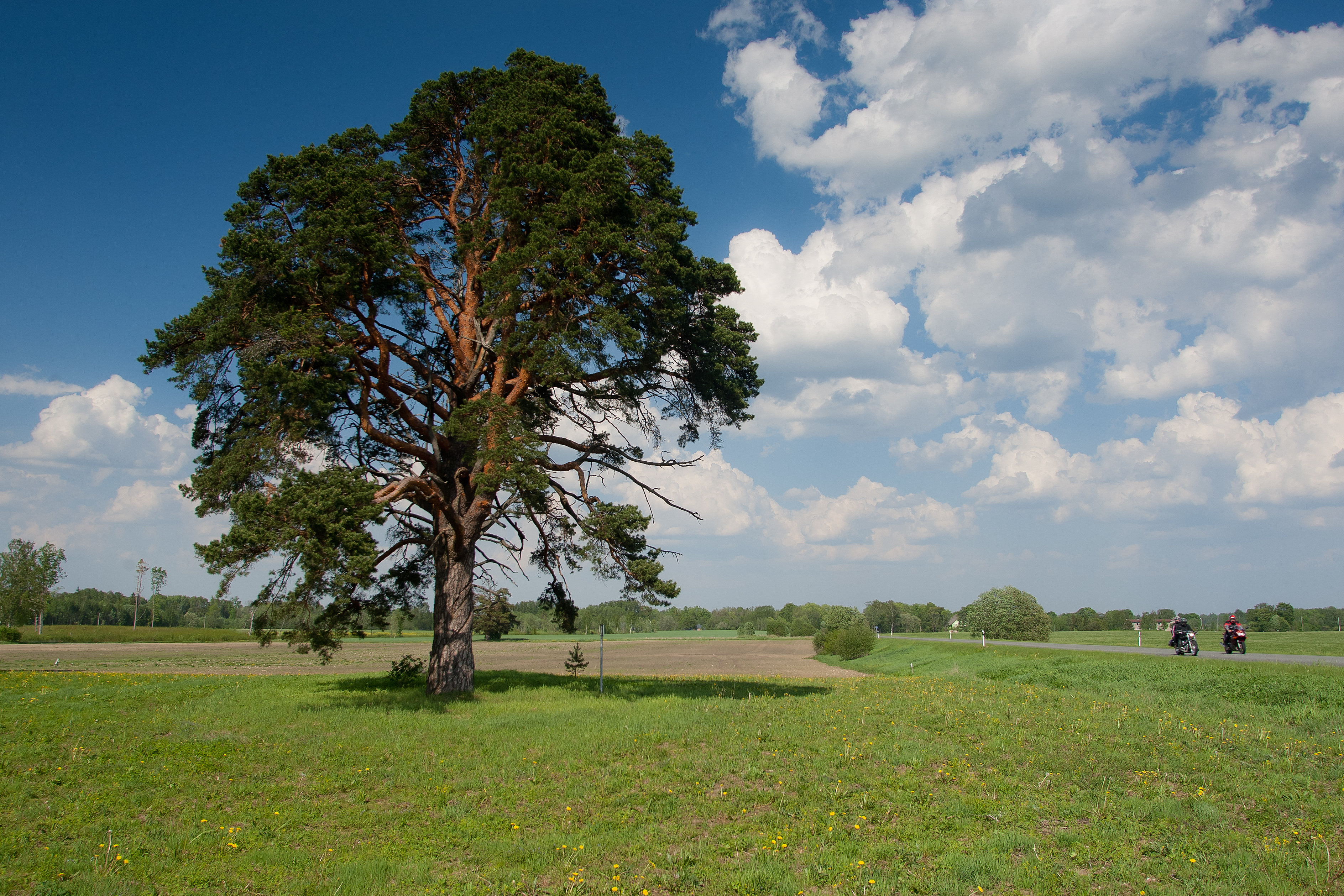 Ojasoo männid (2)